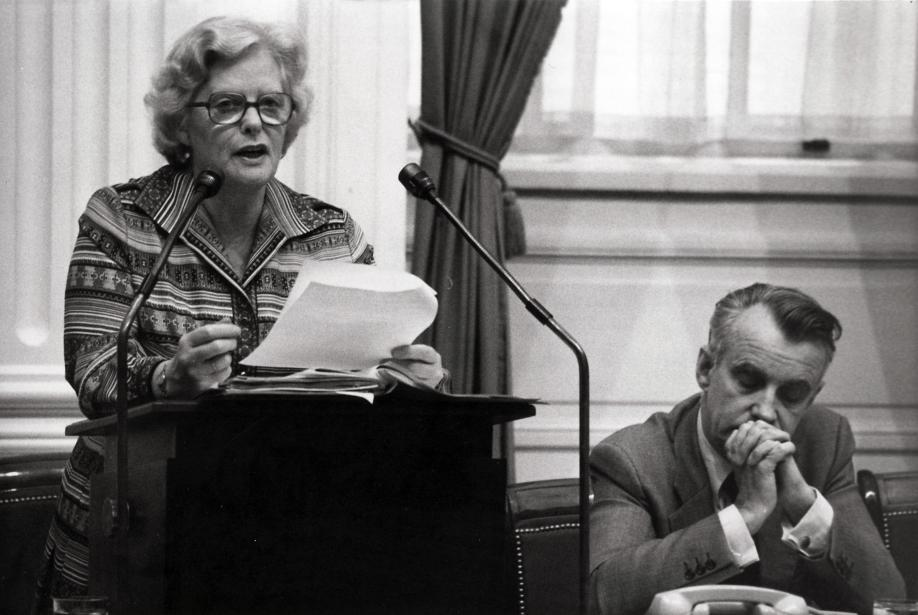 Elisabeth Veder-Smit (VVD) staatssecretaris van Volksgezondheid en Milieuhygiëne tijdens de begrotingsbehandeling in de Tweede Kamer. Den Haag, Nederland, 2 november 1978.